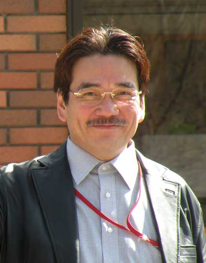 木村義志の肖像2010